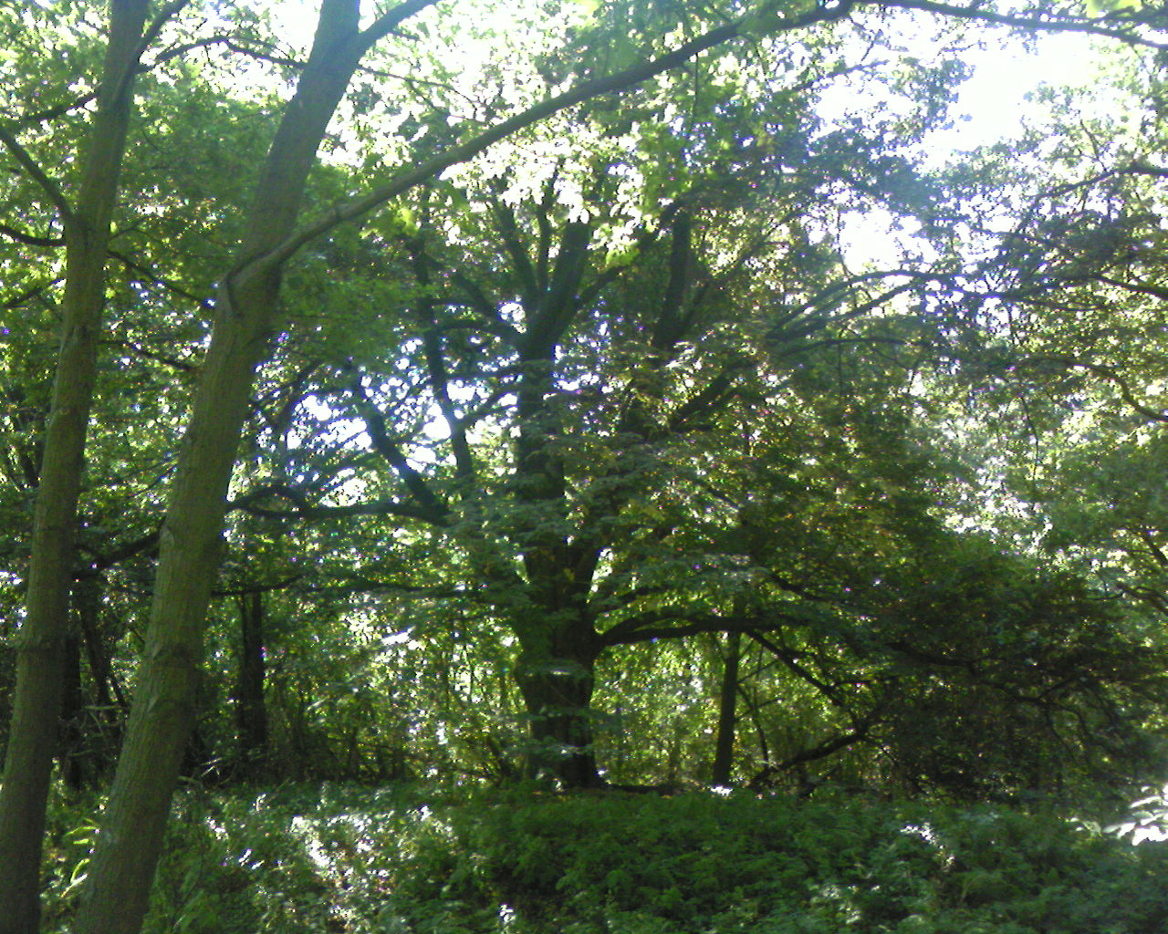 Fotografie der Bernadotte-Linde